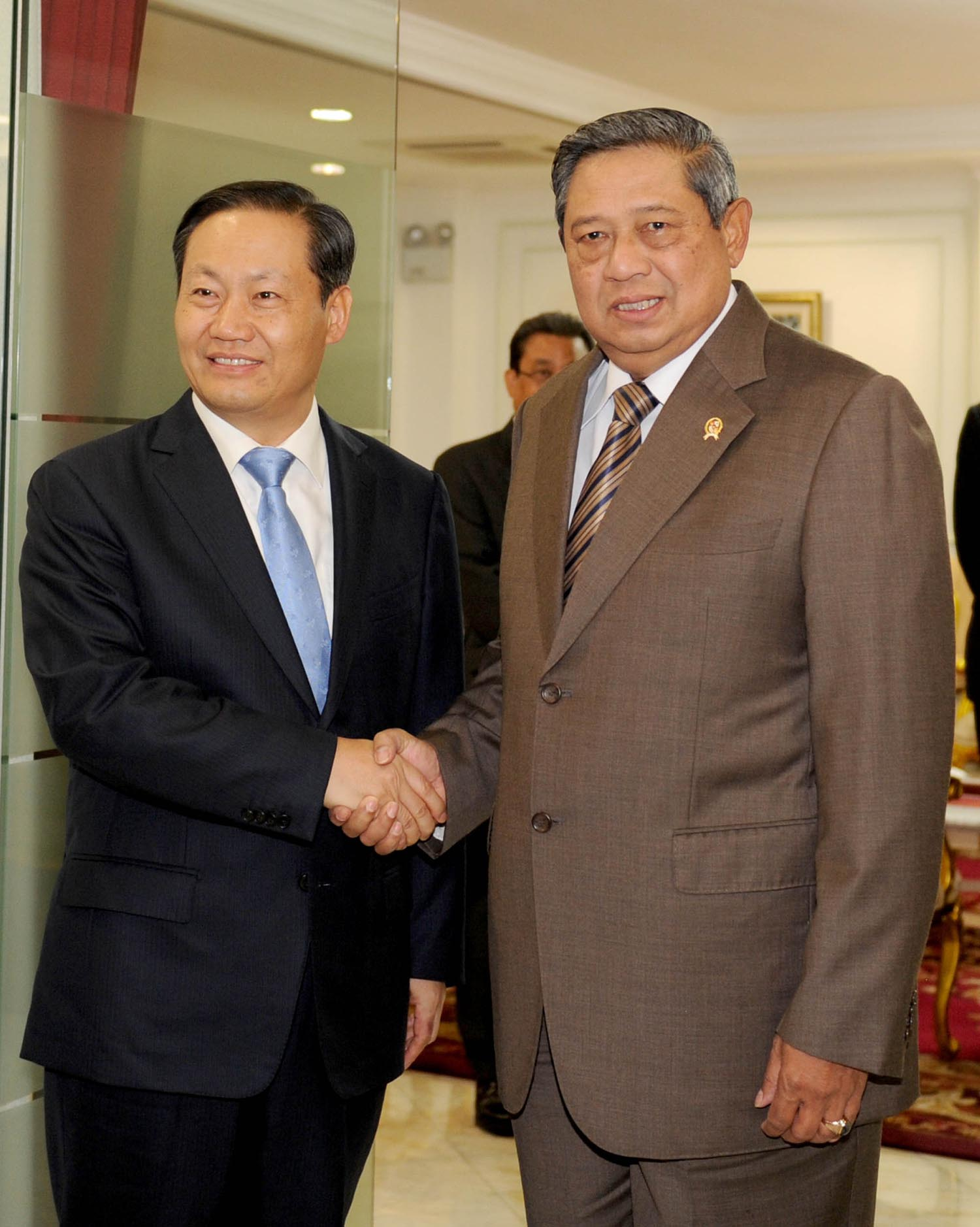 SBY menerima Sekretaris Partai Komunis Cina, Peng Qinghua dan delegasi di Kantor Presiden, 17 Juni 2013.